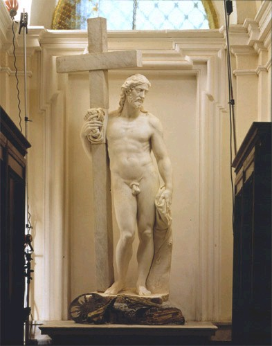 Statua di cristo Portacroce di Michelangelo Bonarroti